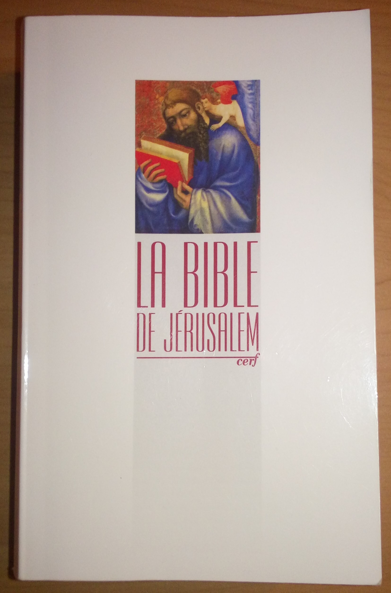 La Bible de Jérusalem (éd. 2014) en petit format. Illustration sur la couverture : Saint Matthieu par Master Theoderich.